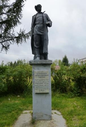 г. Кемь. Республика Карелия.